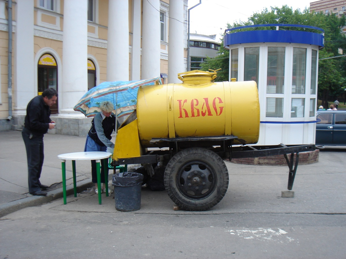 Kwaß-Verkauf in Nishnij Novgorod